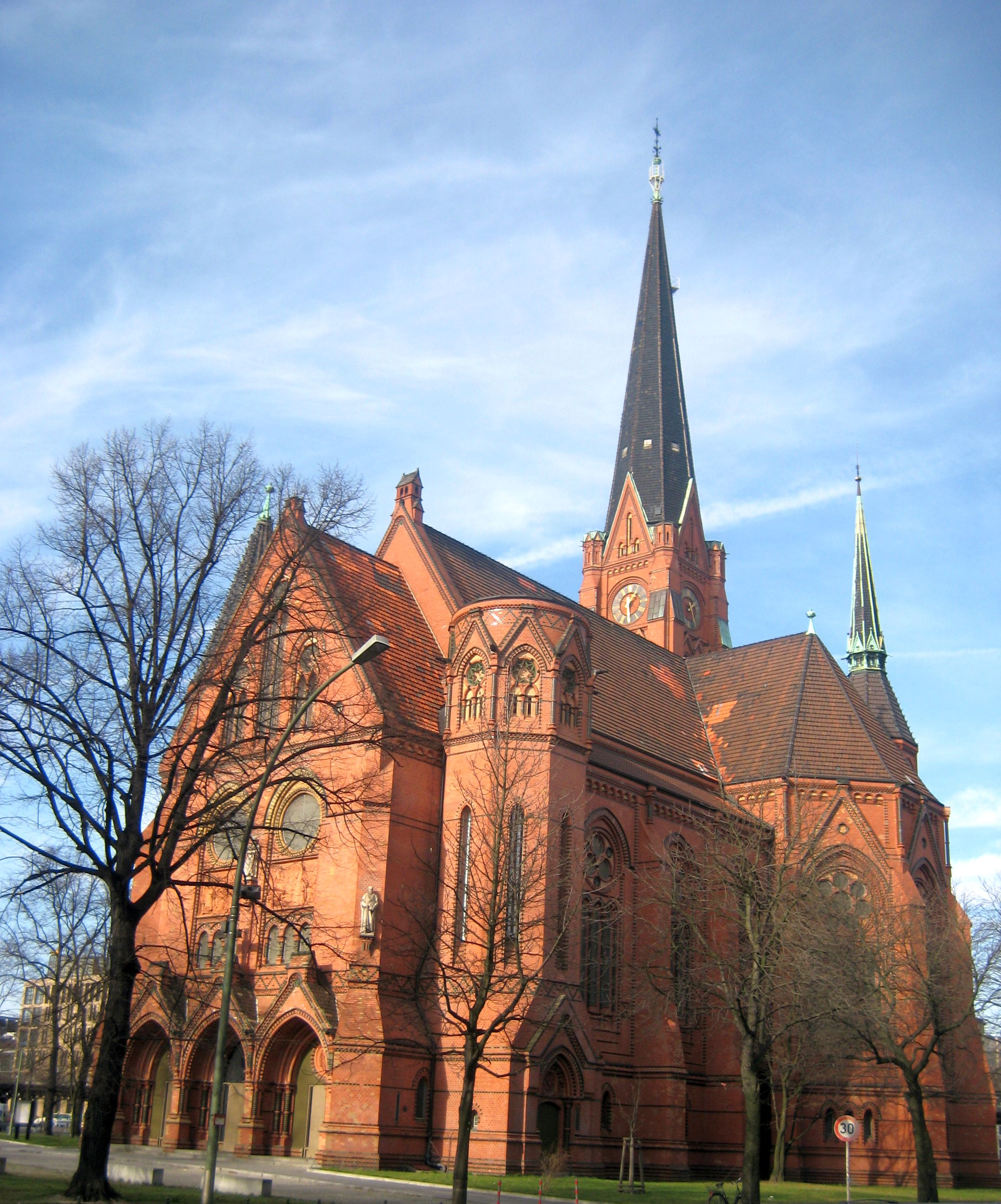 Lutherkirche on Dennewitzplatz in Berlin-Schöneberg, built 1891–1894 by architect Johannes Otzen